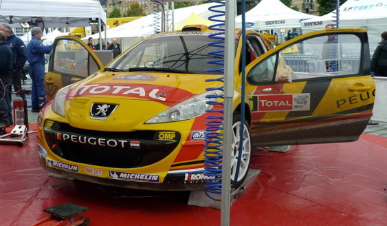 La Peugeot 207 S2000 de Thierry Neuville - IRC 2011